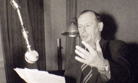 Пётр Петрович Соколов (1891 - 1971) финляндский разведчик-пропагандист